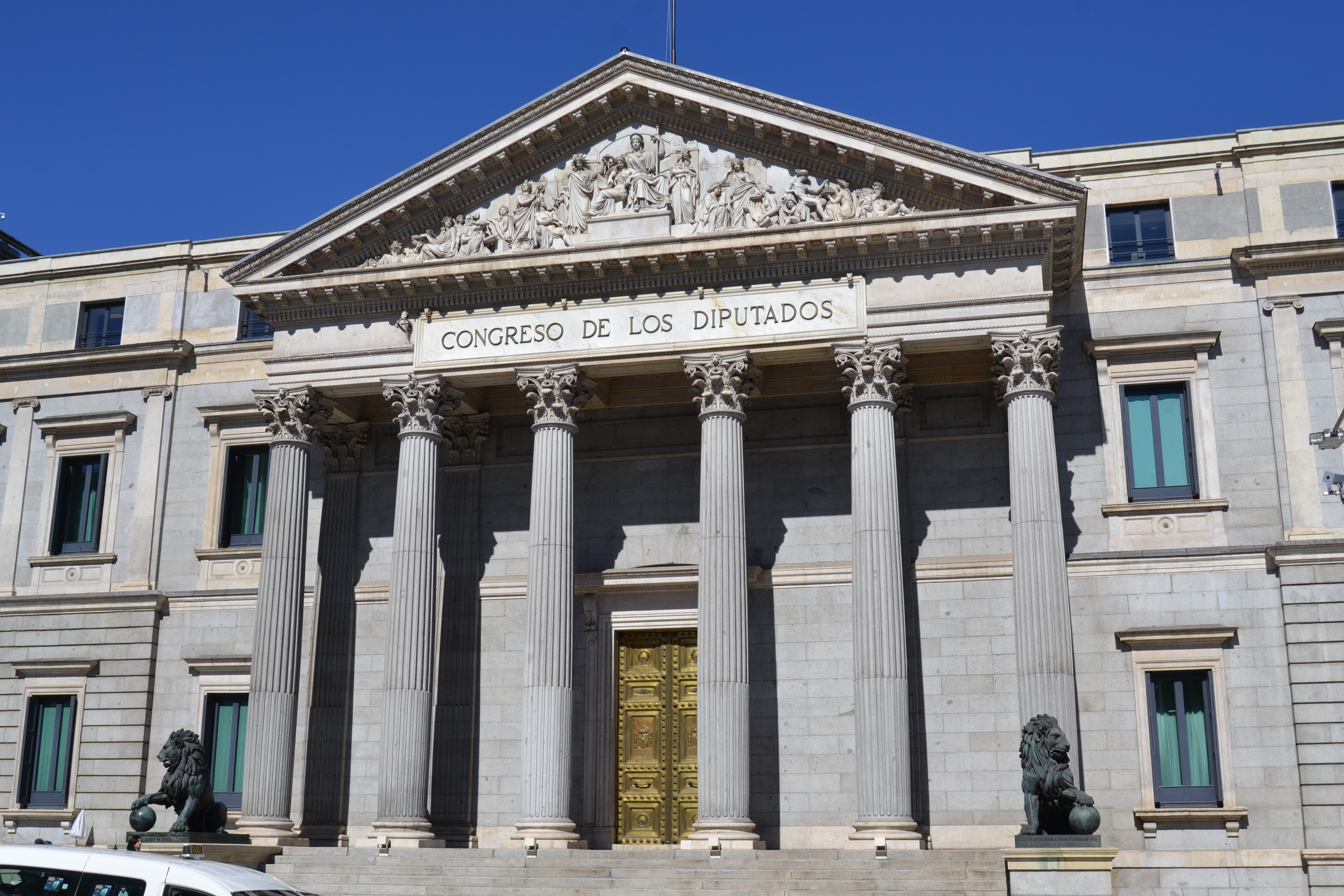 Palacio de las Cortes, Madrid, España Congress of Deputies (Inventory)Native nameCongreso de los Diputados de EspañaParent institutionCortes Generales LocationMadrid, (Spain)Established1977Web page control : Q539149 VIAF: 134718539 ISNI: 0000 0001 1956 4410 GND: 1087366097 SUDOC: 03258167X BNF: 121729241 institution QS:P195,Q539149 Palacio de las Cortes (Inventory)Native namePalacio de las Cortes de MadridLocationMadrid, Spain.Coordinates40° 25′ 00″ N, 3° 41′ 59″ W Established1843–1850Web page control : Q9054619 VIAF: 173679168 ULAN: 500302409 LCCN: sh2013000847 GND: 4228303-6 BNE: XX189659 WorldCat institution QS:P195,Q9054619